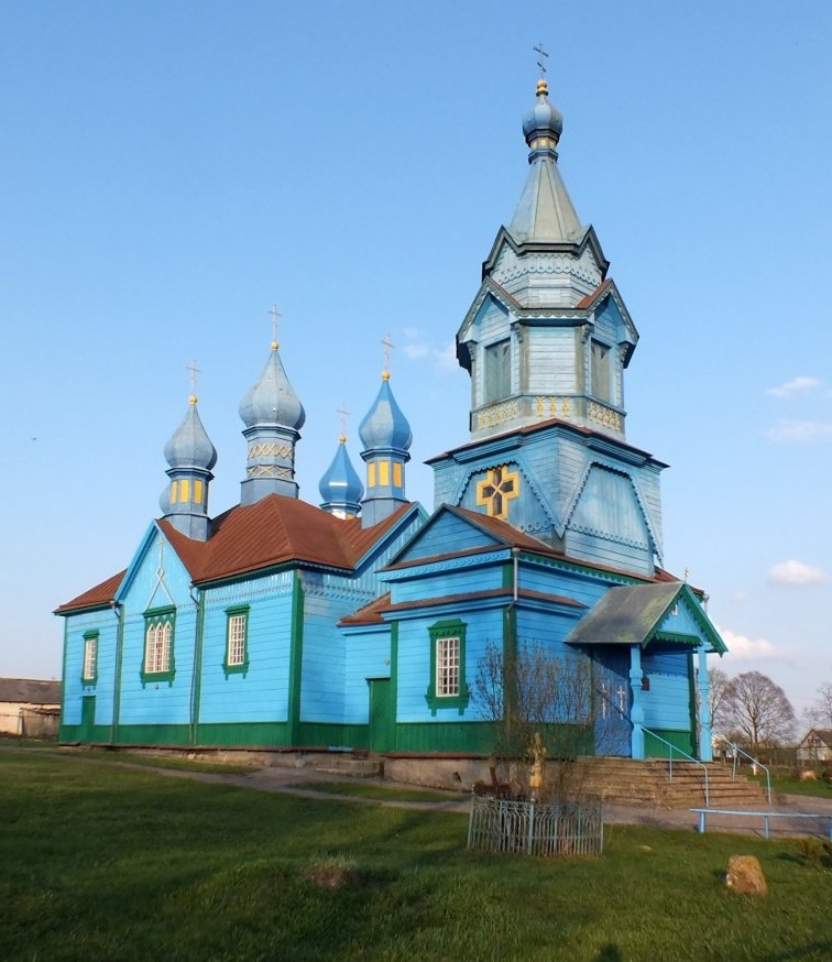 Мікалаева. Царква Святой Параскевы Пятніцы